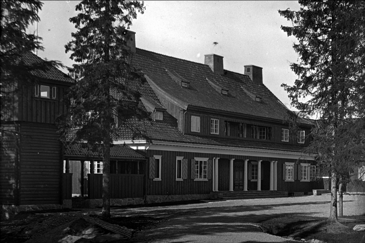 Huset som Røwde bygde i Voksenkollveien 14 i 1920.